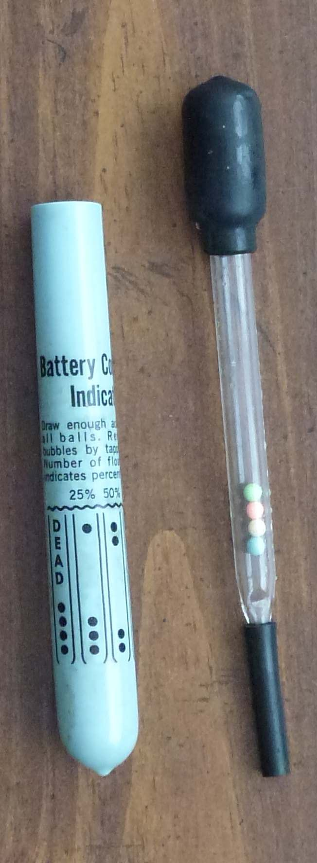 Accu capaciteit meter (+- 1985) om te bepalen wat de ladingsgraad is van de accu.